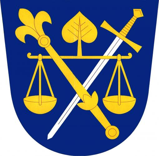 Komorovice znak